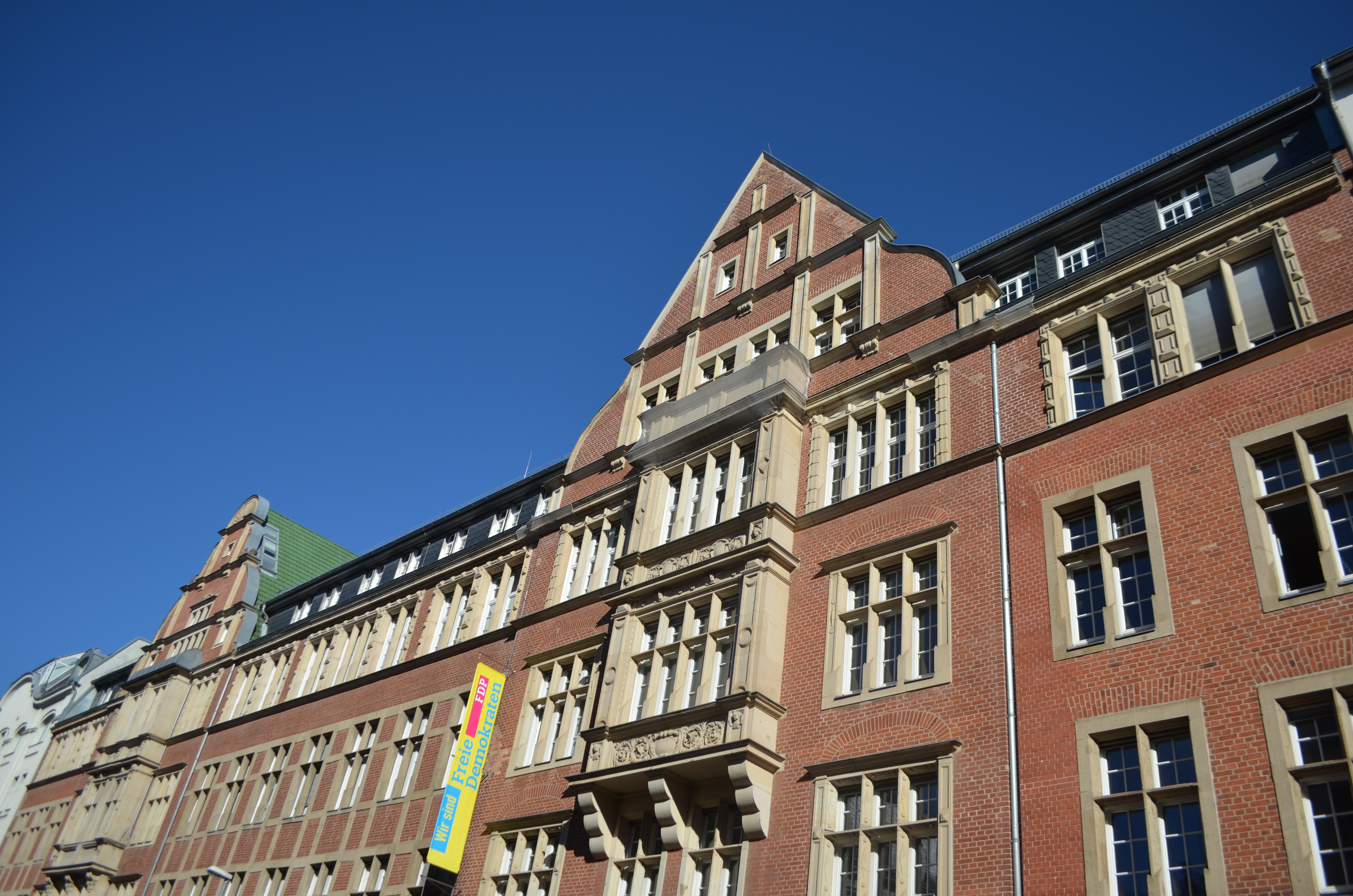 Hans-Dietrich-Genscher-Haus in Berlin